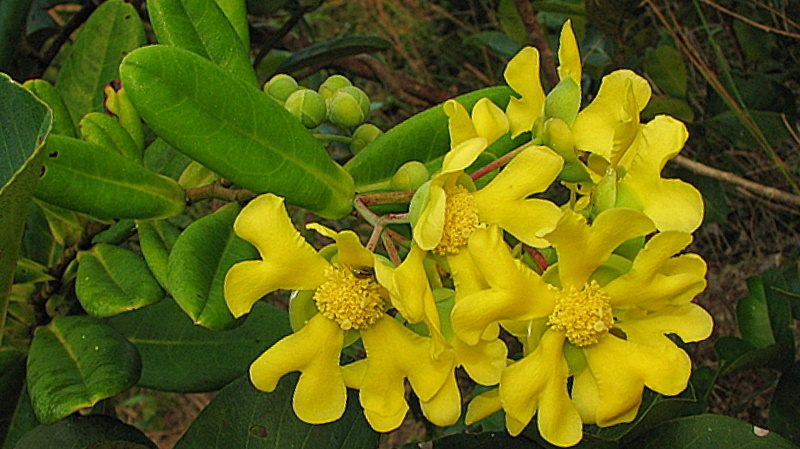 Davilla sessilifolia Fraga